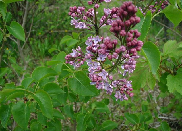 Syringa vulgaris